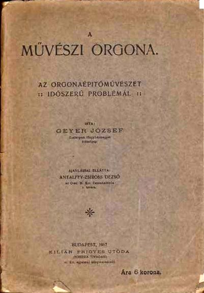 A művészi orgona. Az orgonaépitőművészet időszerű problémái.